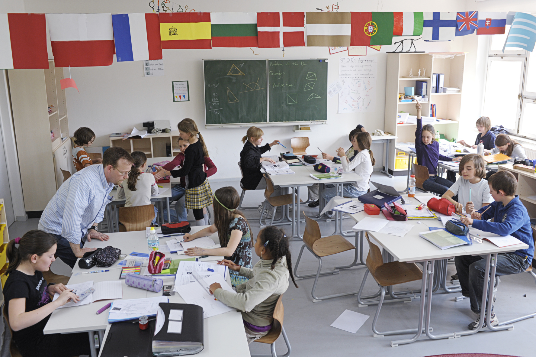 Unterricht